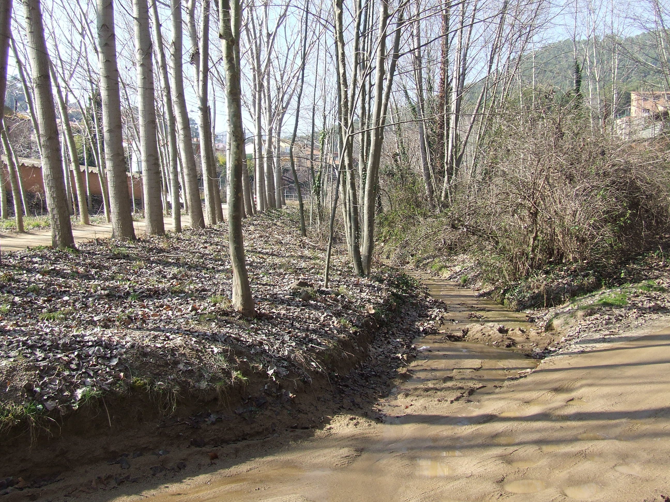 El torrent de la Torre (Bigues, Bigues i Riells, Vallès Oriental)